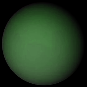 Representación artística del "Planeta Nueve"